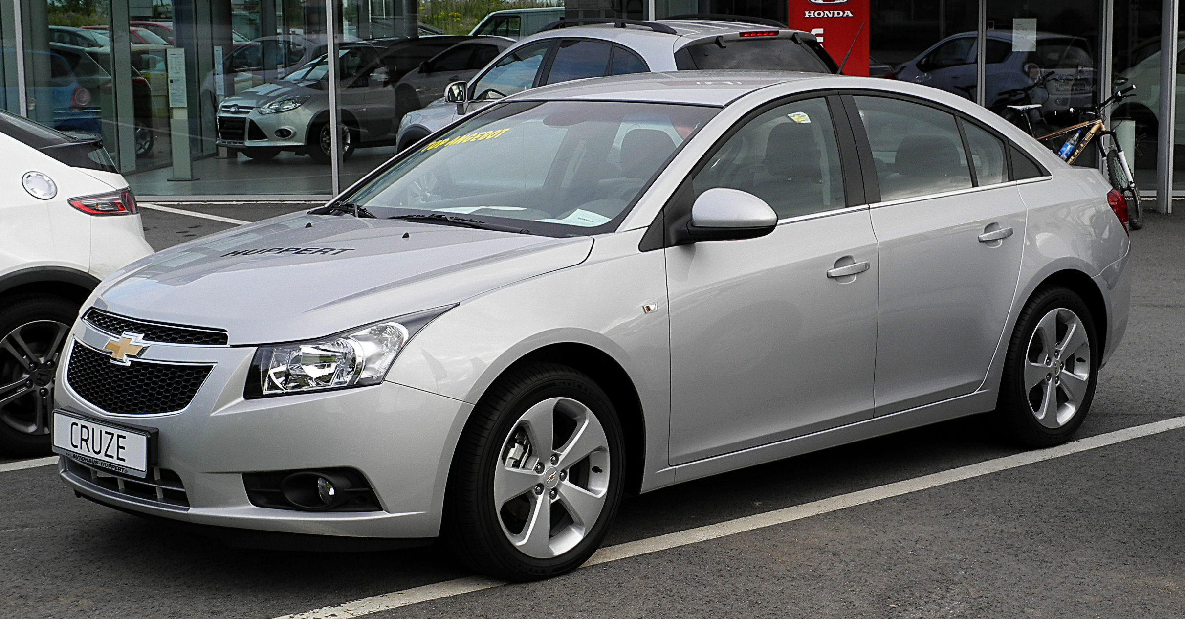 Chevrolet Cruze LT 1.8